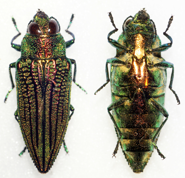 Buprestidae - In collection